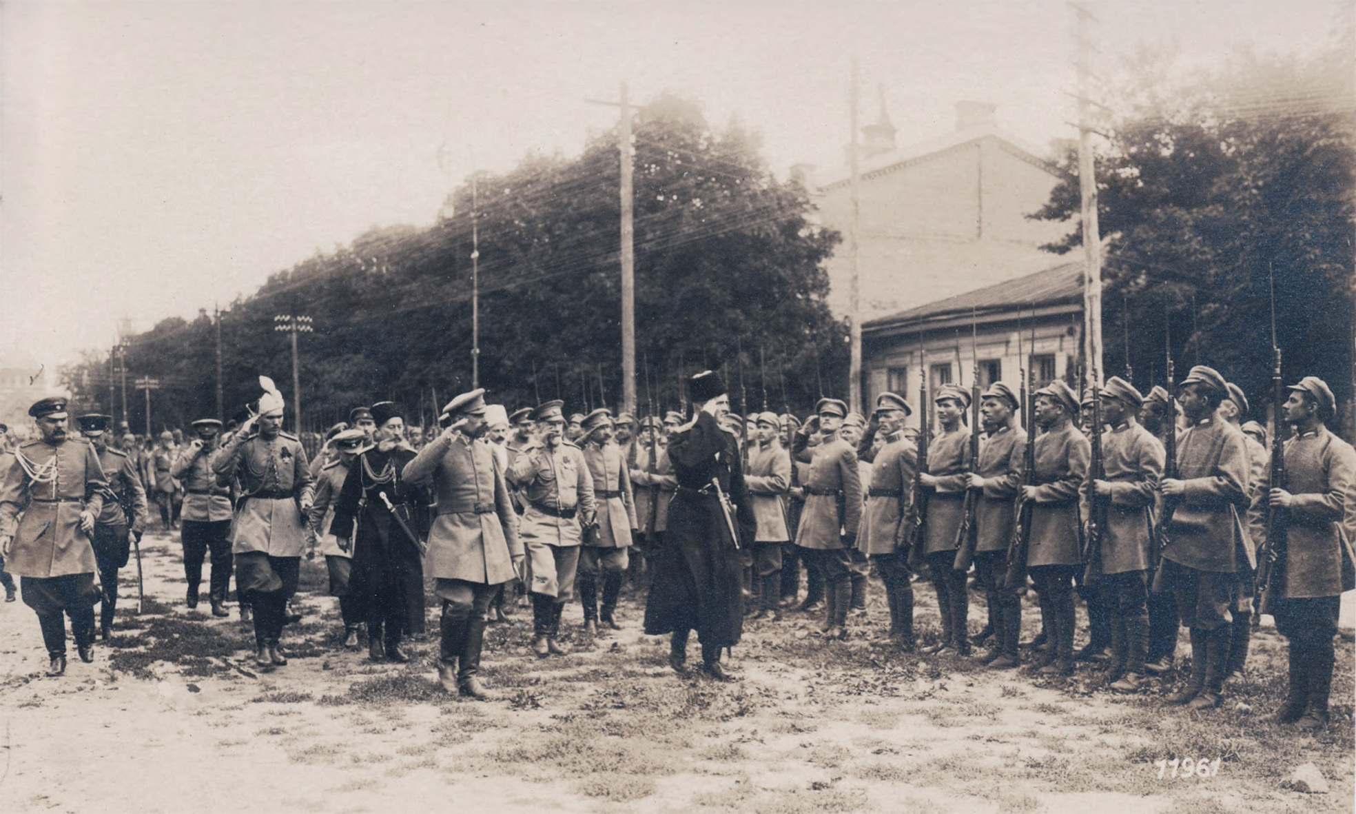 Гетьман Павло Скоропадський оглядає Сірожупанників. Позаду гетьмана - військовий міністр Української Держави Олександр Рогоза. Катерининська вулиця Київ, 27.08.1918